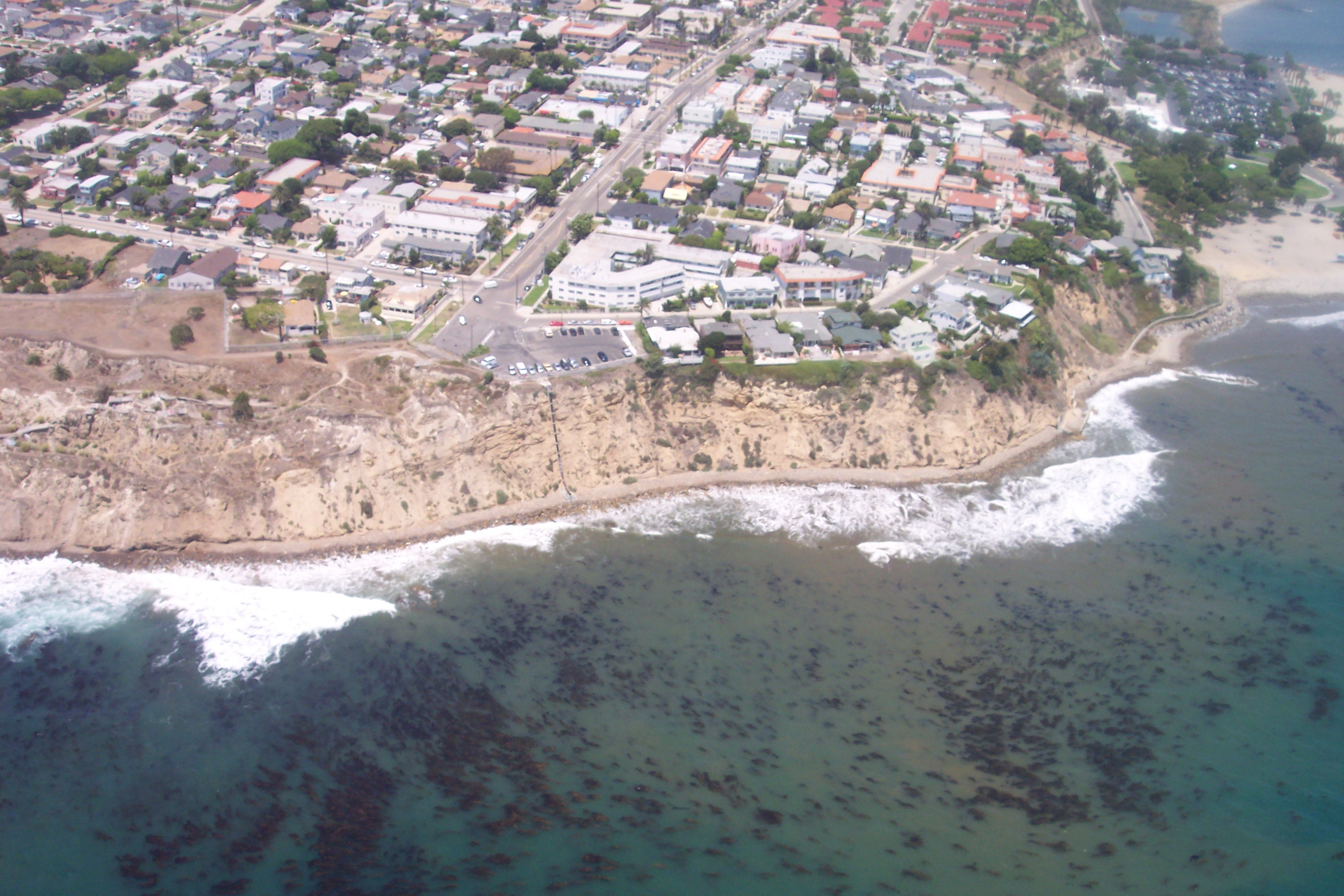 Sunken City, San Pedro, CA